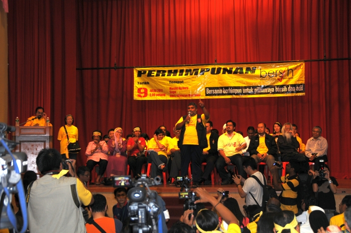 A. Samad Said: A Samad Said hadir semasa pelancaran Perhimpunan Bersih 2011.